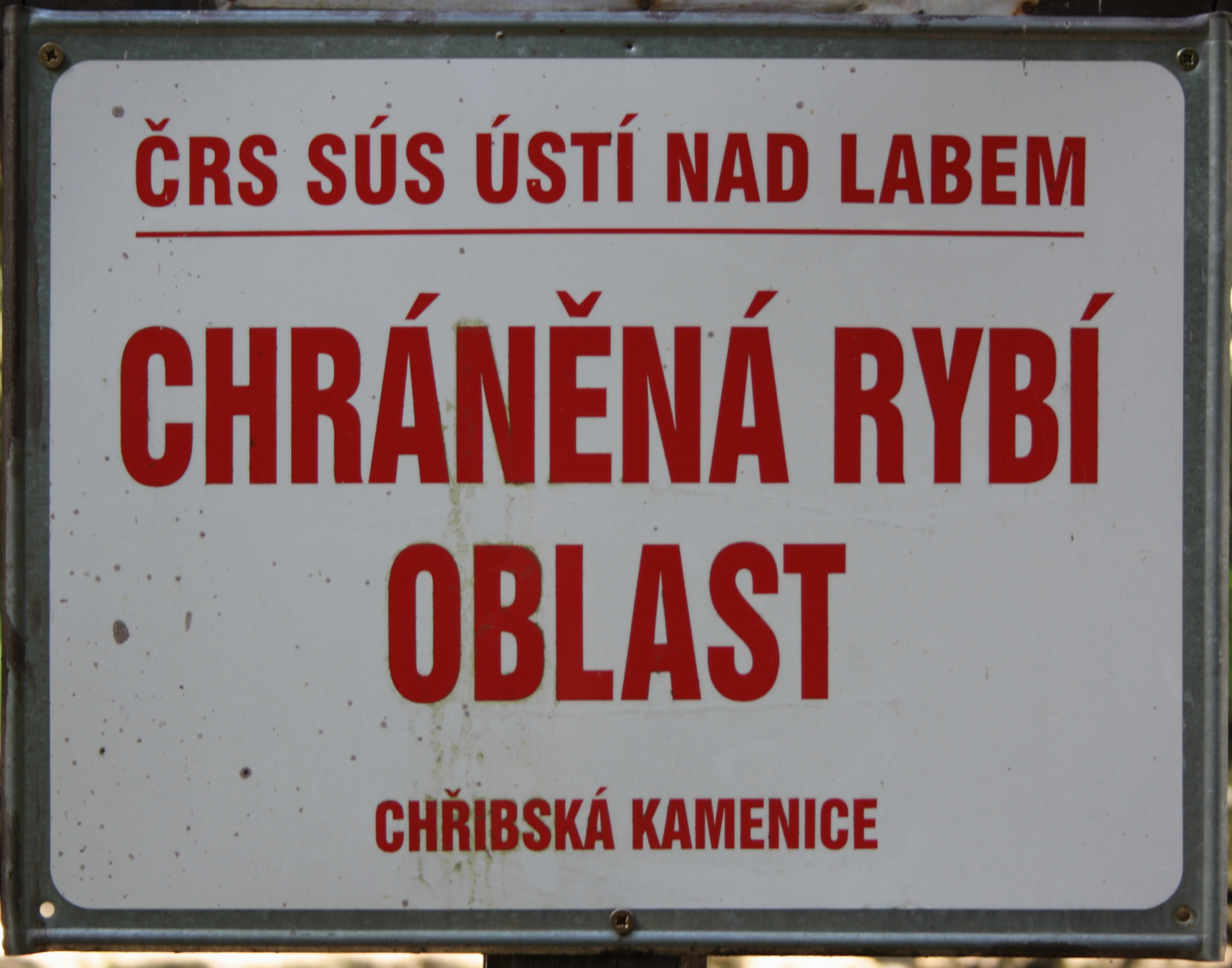 Pavlino údolí